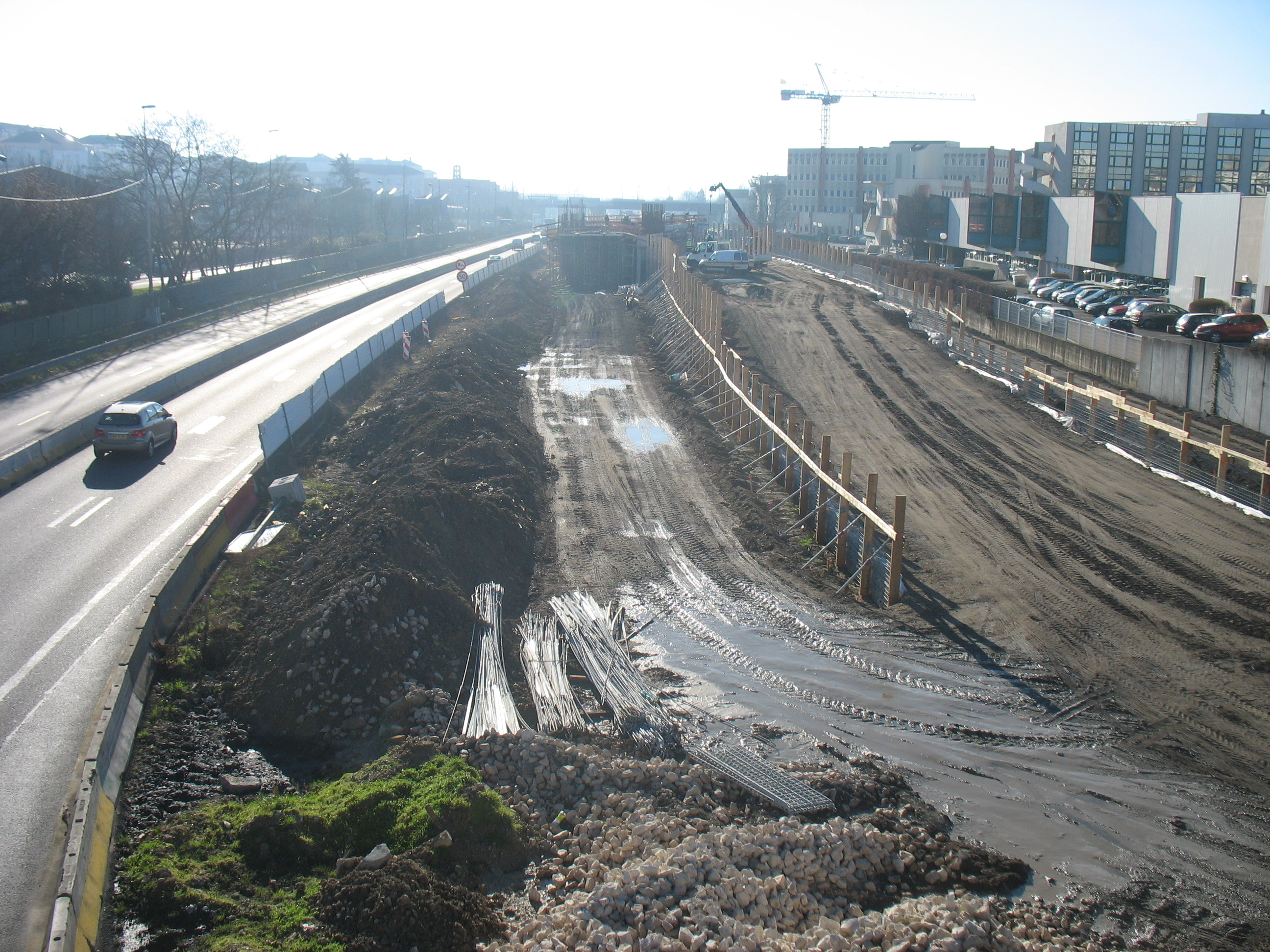 La voie routière RD1 va passer au dessus des voies férres de la ligne8